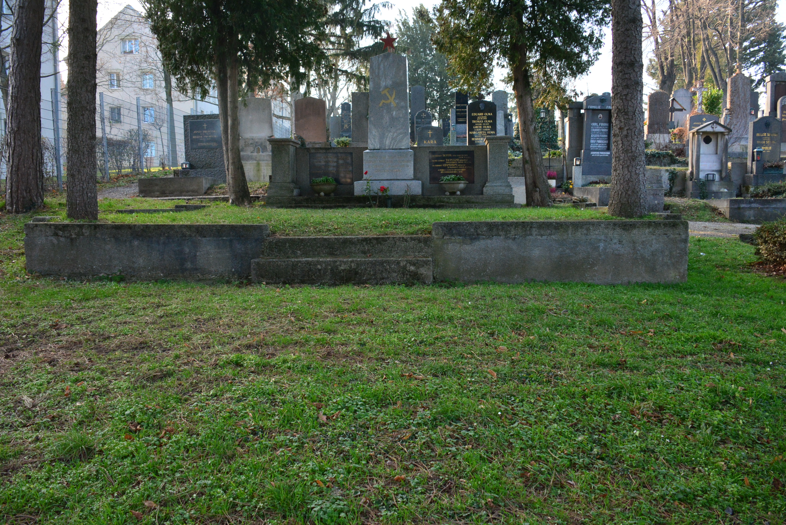 Russischer Soldatenfriedhof auf dem Gersthofer Friedhof in Wien-Währing